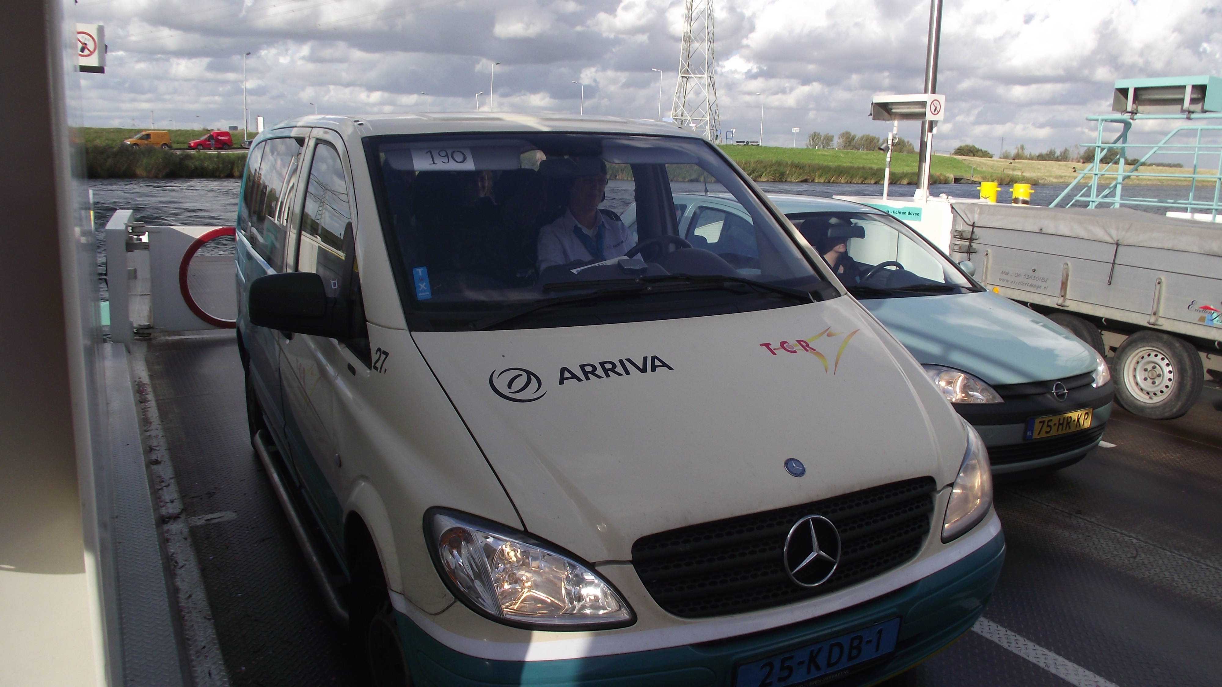 Taxibus van Arriva van lijndienst 190 op de veerboot over de Spui bij Nieuw-Beijerland.